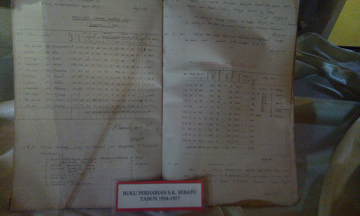 Buku Perharian Tahun 1954-1957